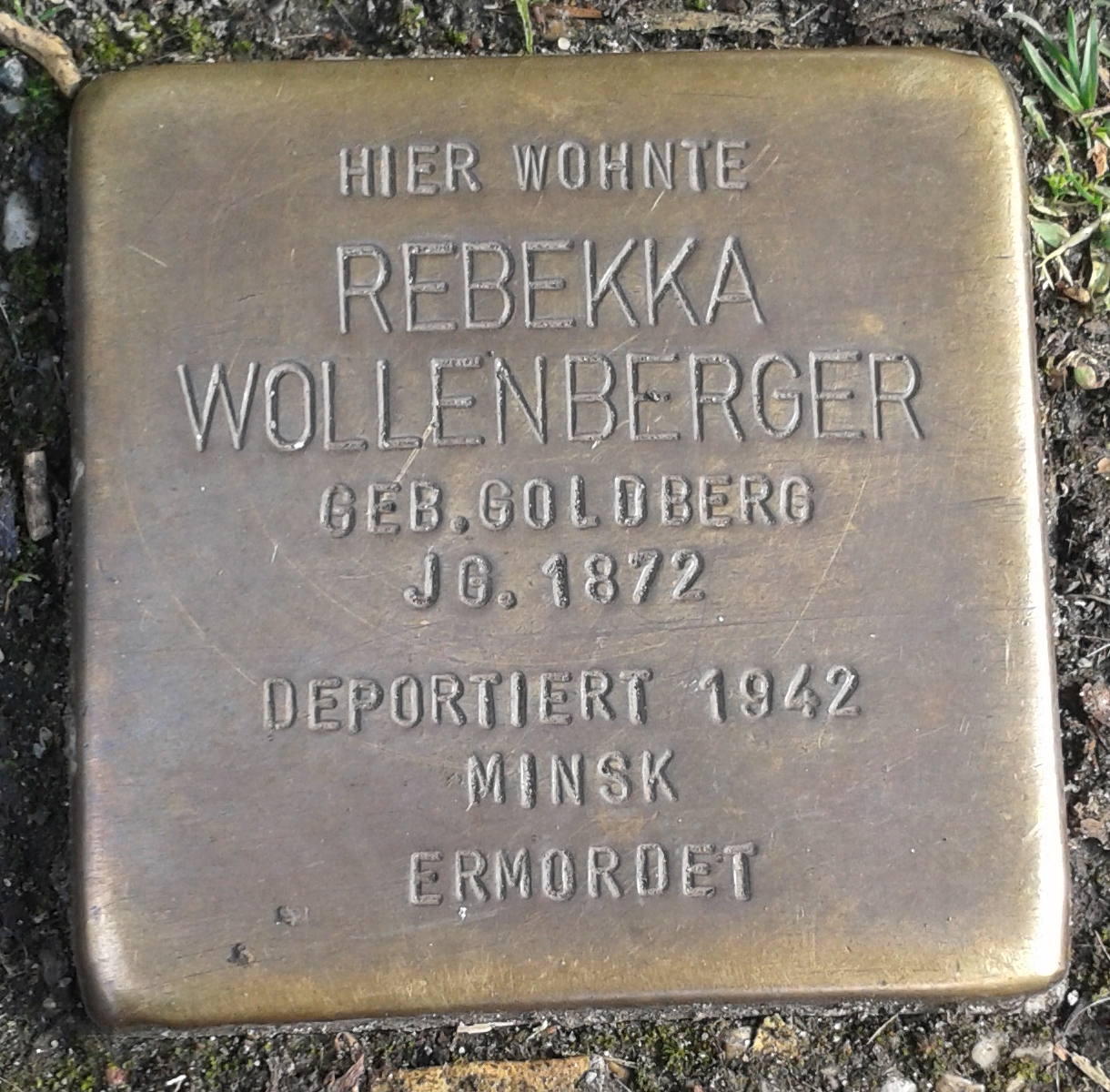 Stolperstein Selm Hauptstraße 15a Rebekka Wollenberger